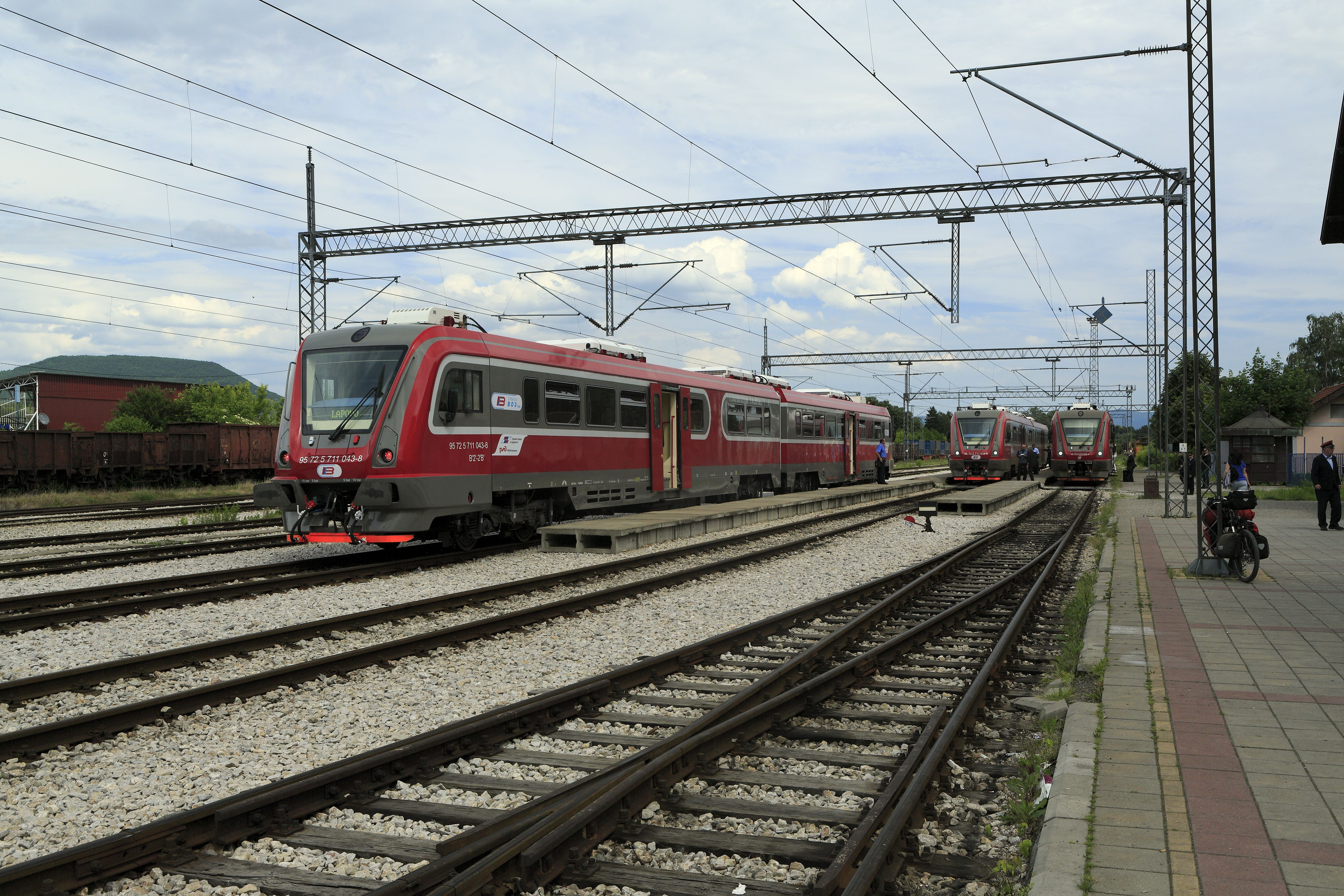 Drei bereitgestellte Personenzüge, Richtung Lapovo, Požega und Kosovska Mitrovica. Die Strecke nach Požega ist durchgehend elektrifiziert, der Einsatz von Dieseltriebwagen auf dieser Strecke ist zumindest fragwürdig.